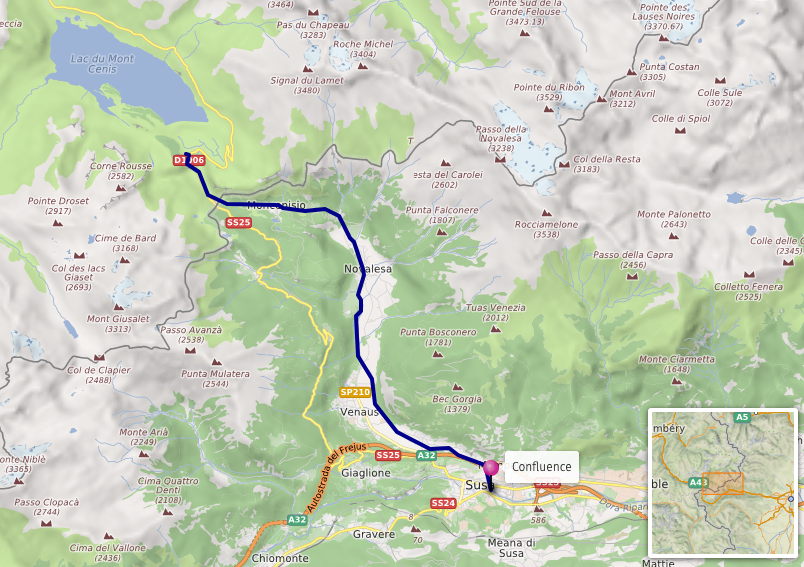 Carte d'après les données openstreetmap This map may be incomplete, and may contain errors. Don't rely solely on it for navigation.